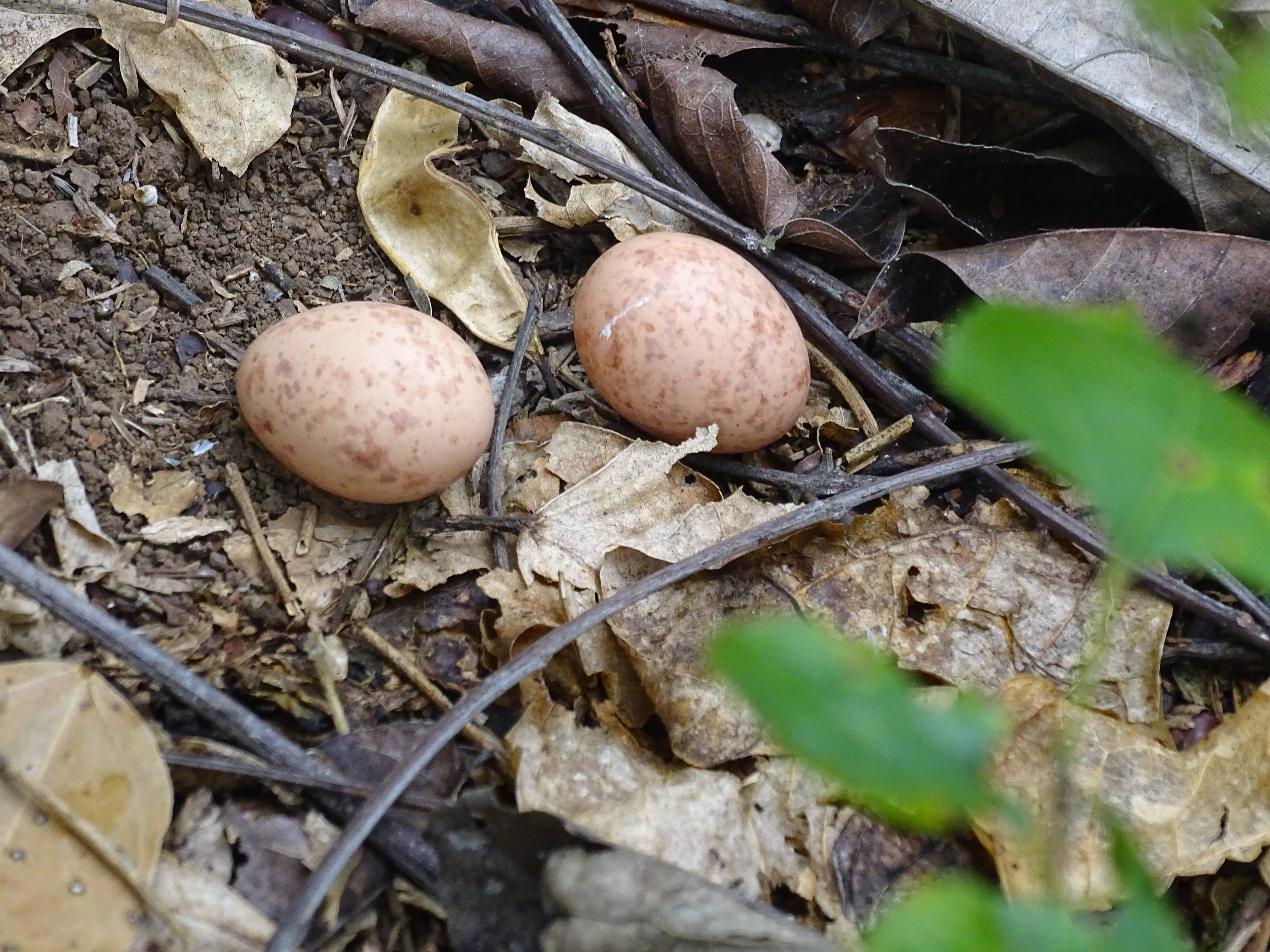 Oeufs d'engoulevent sur un bord de sentier dans le canton de Turrialba, Costa Rica